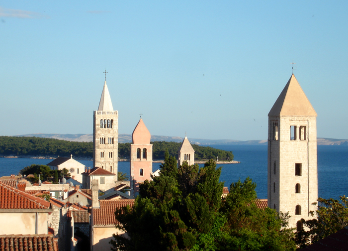 I quattro campanili di Rab visti dalla torre di San Cristoforo